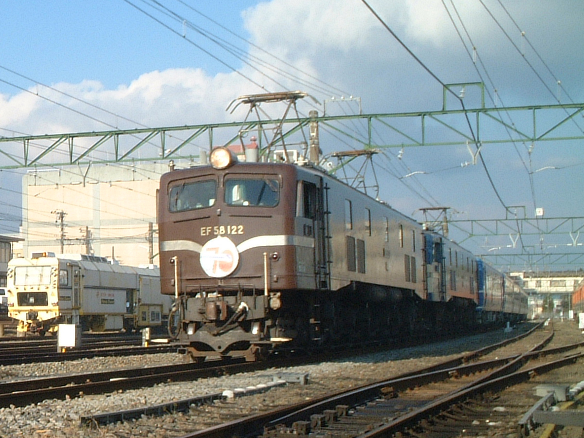 EF58形 電気機関車 122号機